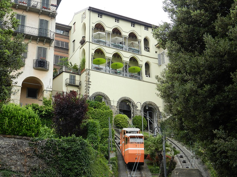 Bergamo - Funicolare per Città Alta